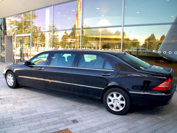 Mercedes-Benz S 600 Pullmann